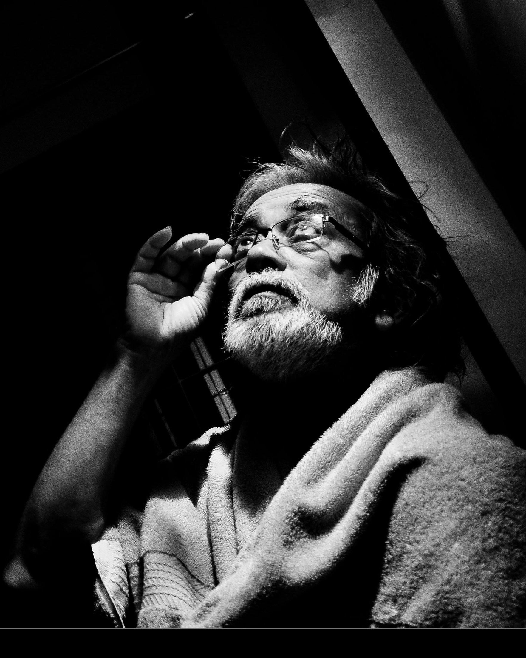 আনোয়ার হোসেন, আলোকচিত্রী, চিত্রগ্রাহক